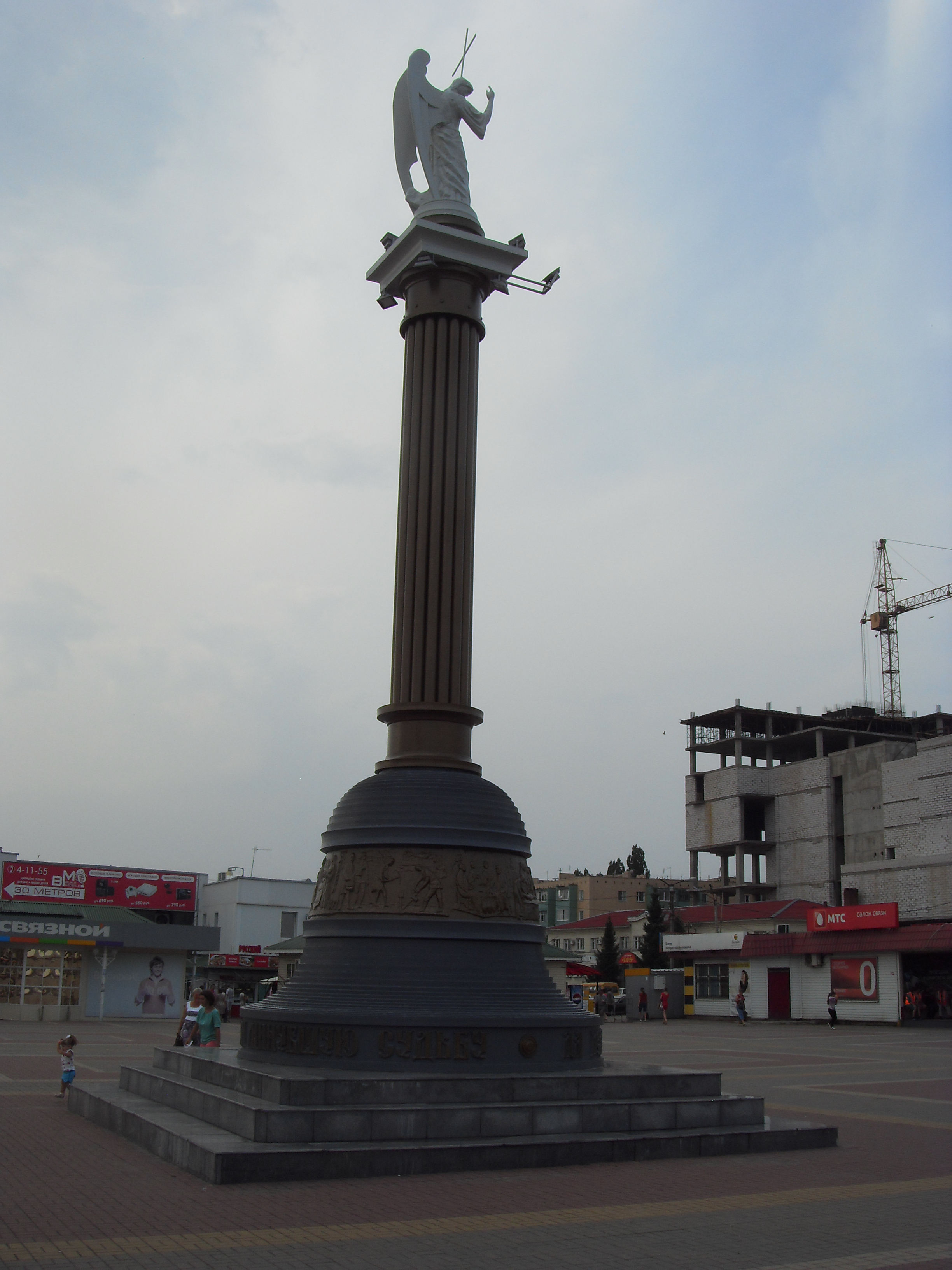 Liski, Voronezh Oblast, Russia